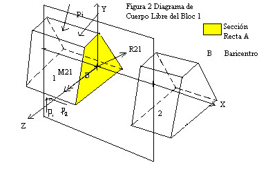 Esfuerzos Internos Figura 2 Imagen creada por el usuario Bernardogu_ar para el uso en Wikipedia